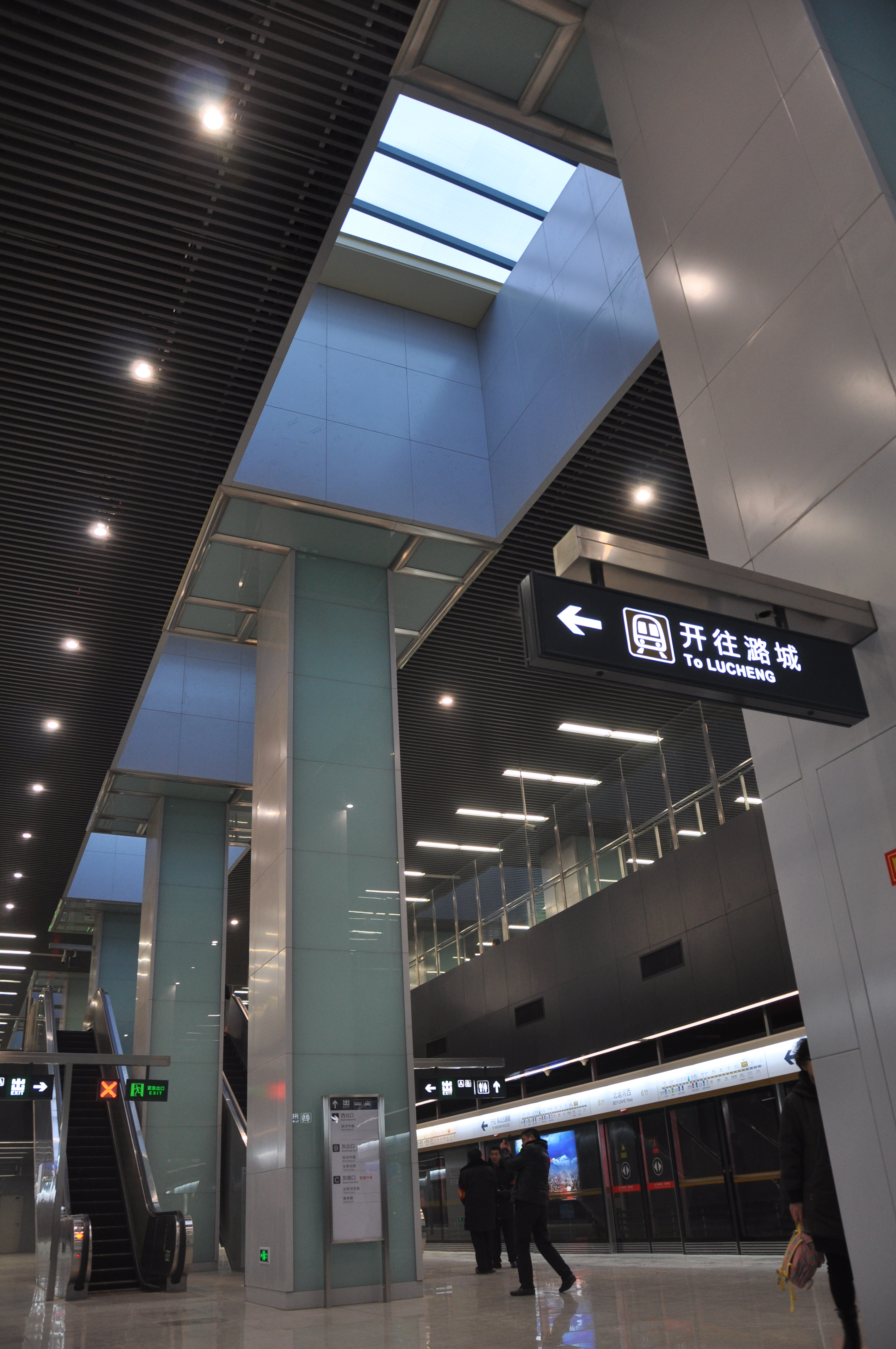 北运河西站站台，上方没有站厅层楼板，可见车站顶棚及上方天窗